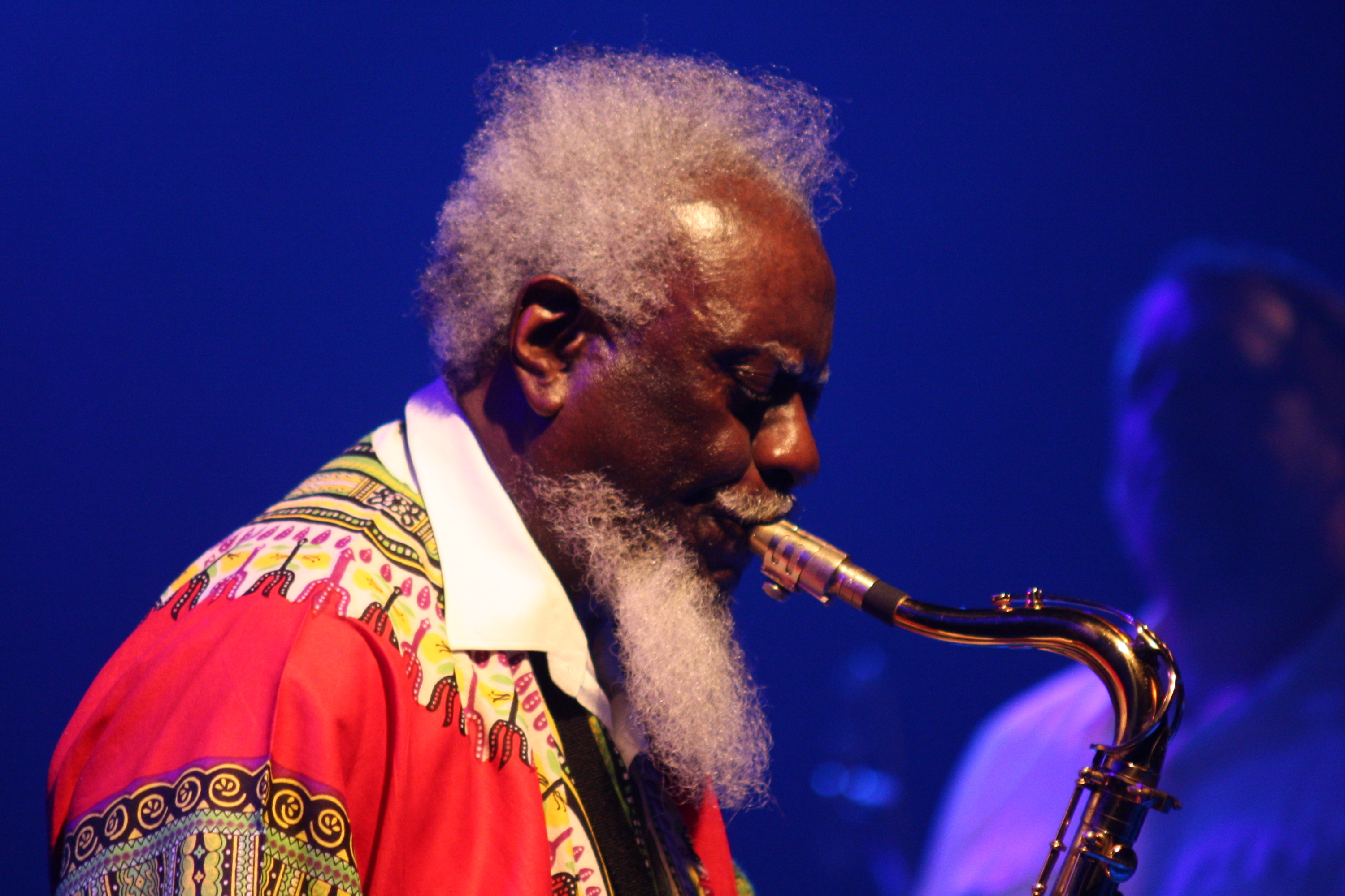 44. Deutsches Jazzfestival Frankfurt 2013: Pharoah Sanders